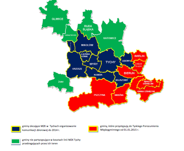 Map of area public transport from public transport institution in Poland region Silesia, city Tychy